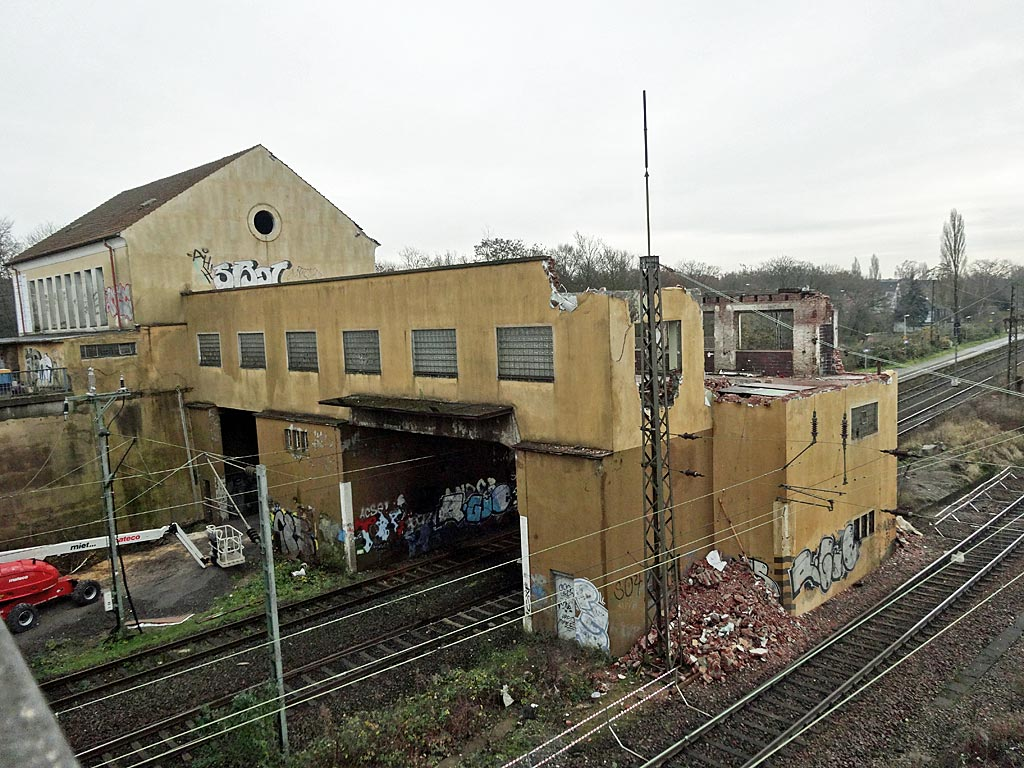 Die Abrissarbeiten an der Personenbrücke wurden am 12.12.2015 begonnen.